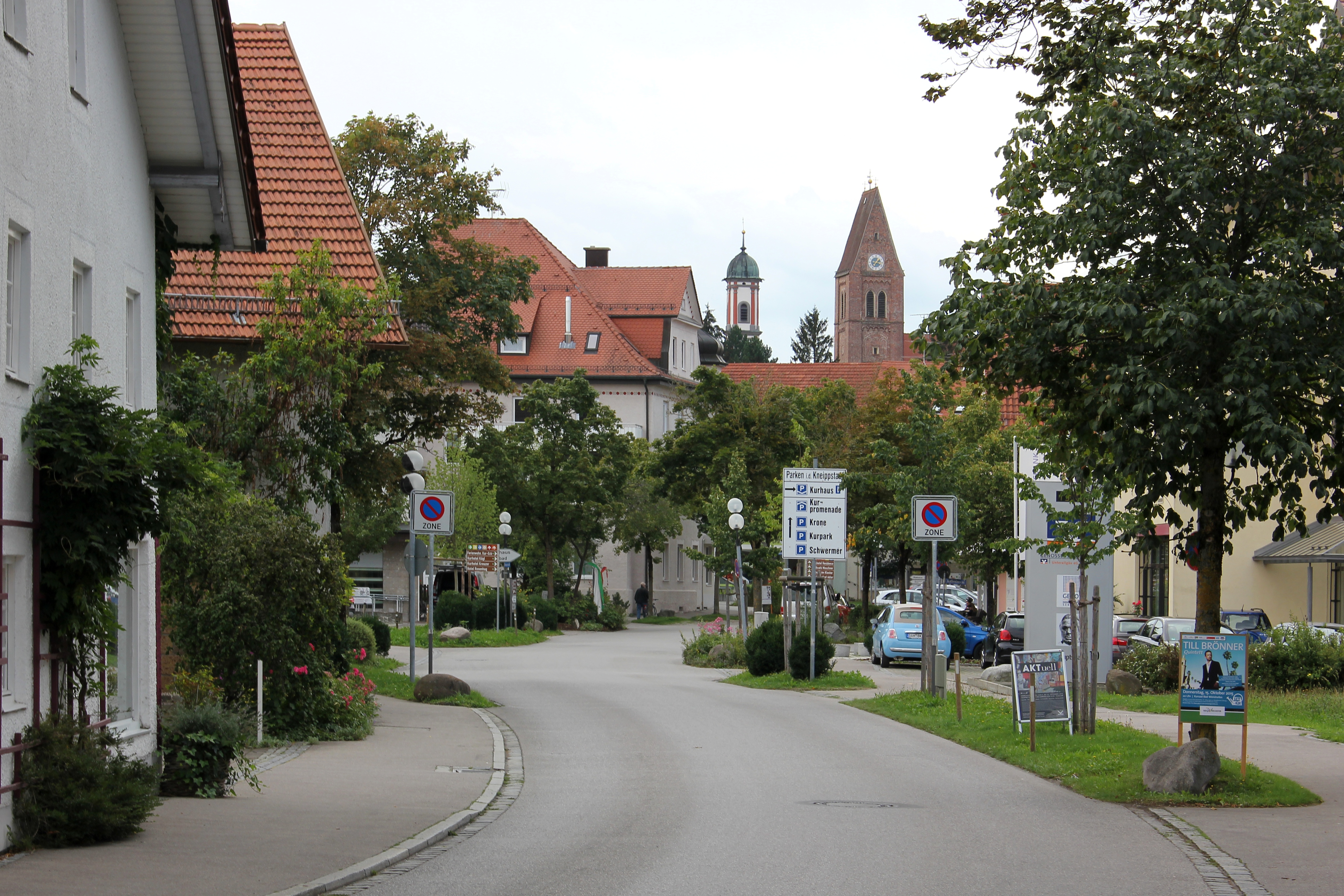 Bad Wörishofen, Hauptstraße; im Hintergrund die Türme der Klosterkirche (links) und der Pfarrkirche St. Justina